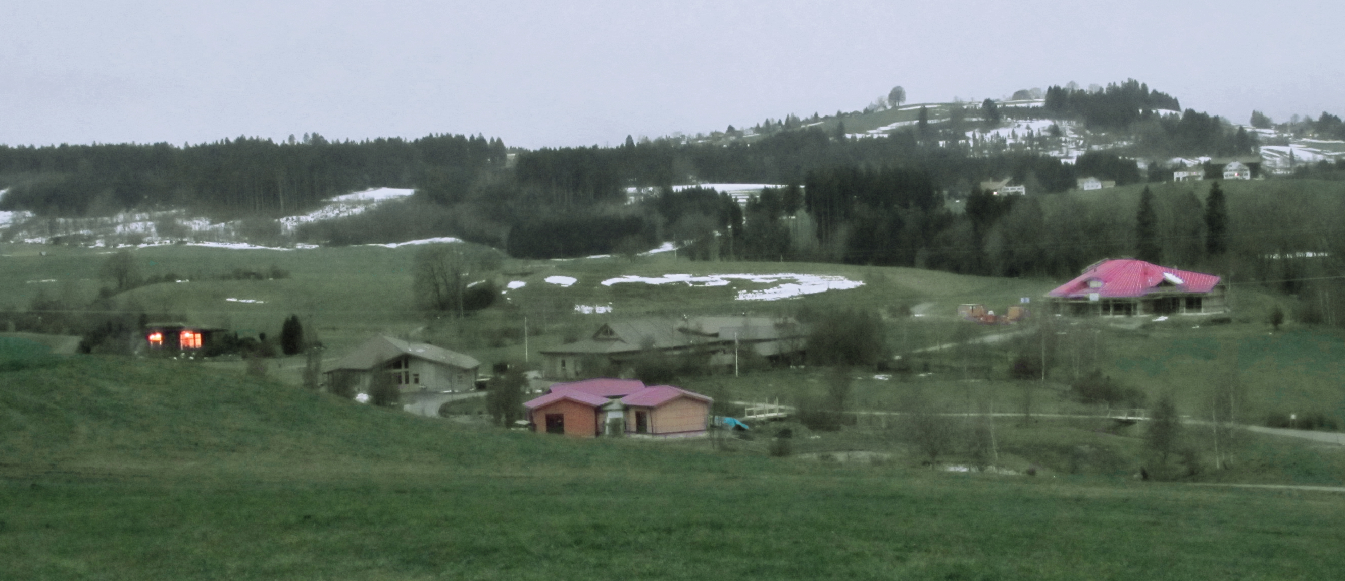 Ansicht auf die Freie Schule Albris bei Kempten im Januar 2013